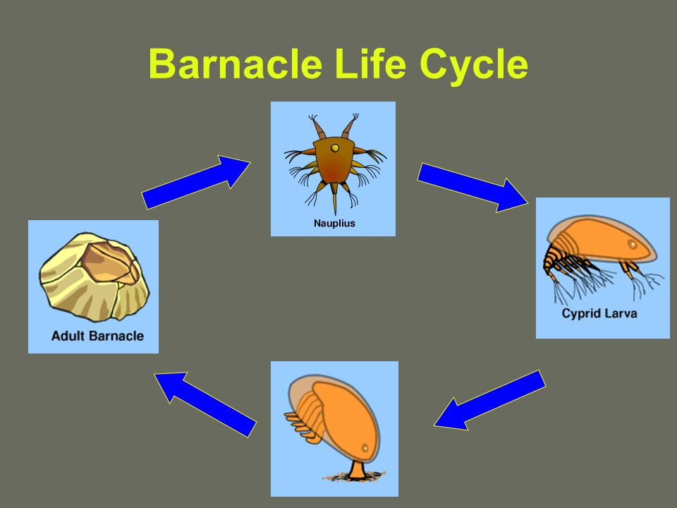 Hrúðurkarls